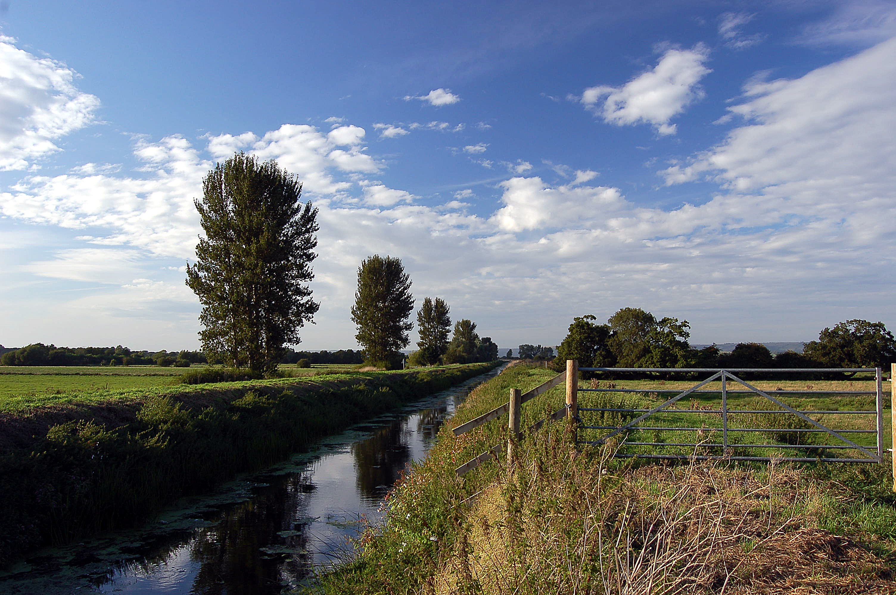 River Brue